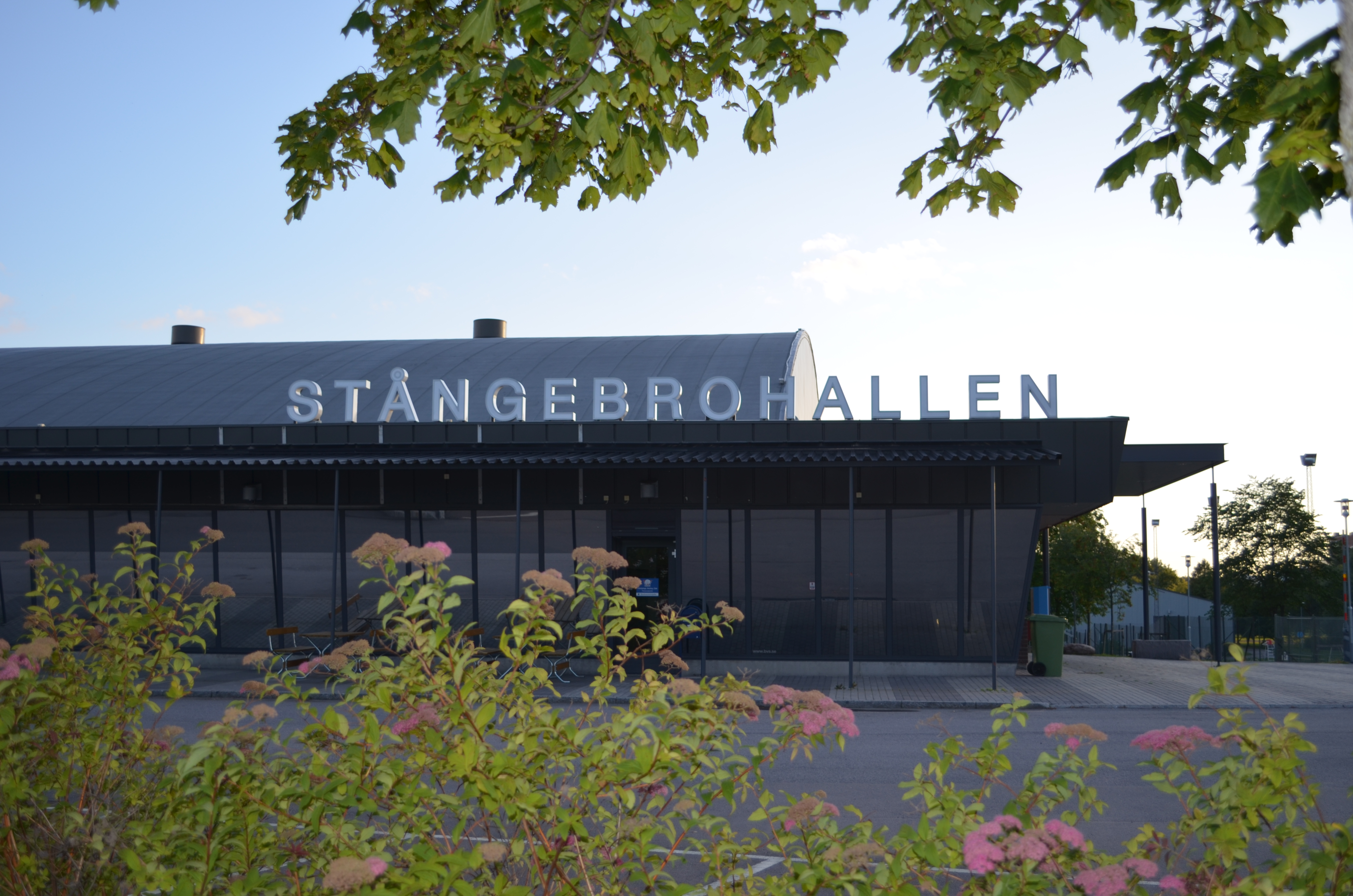 Stångebrohallen, Linköping fotograferad under Kruosio och Mannen av börds sightseeing i Linköping.